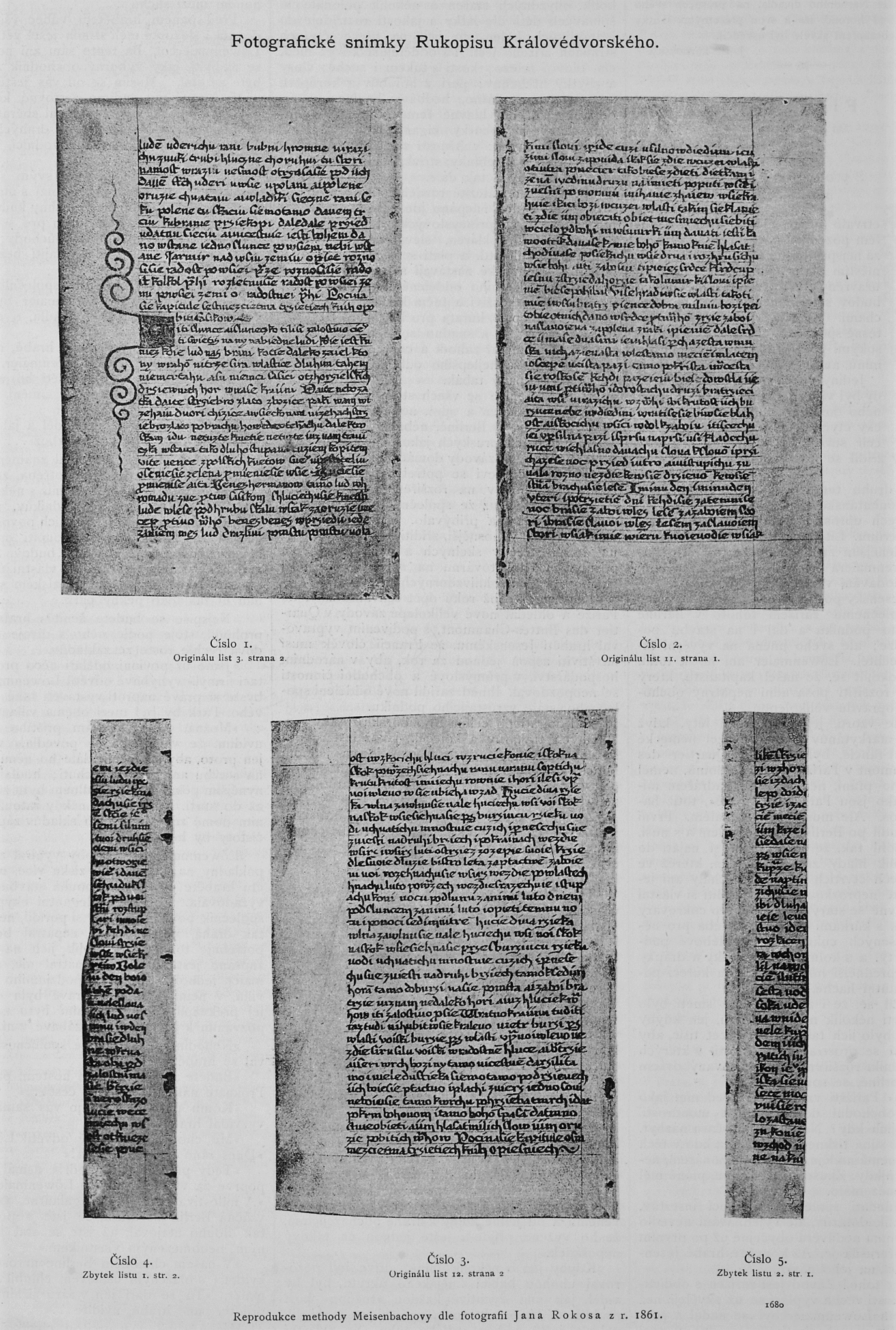 Fotografie Rukopisů pořízená Ant. Vrťátkem